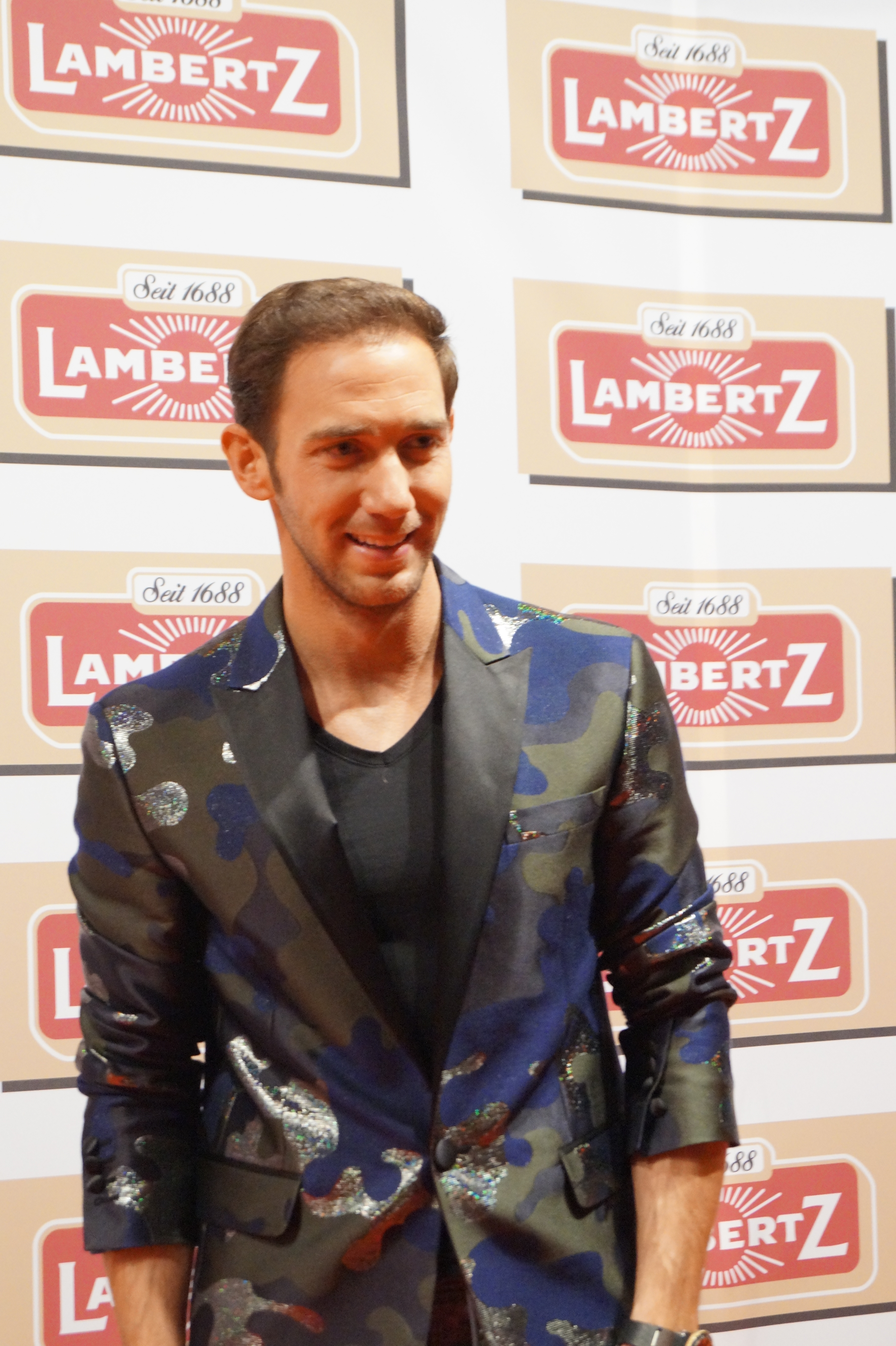 "Lambertz Monday Night 2015" im "Alten Wartesaal" in Köln, am 02.02.2015.